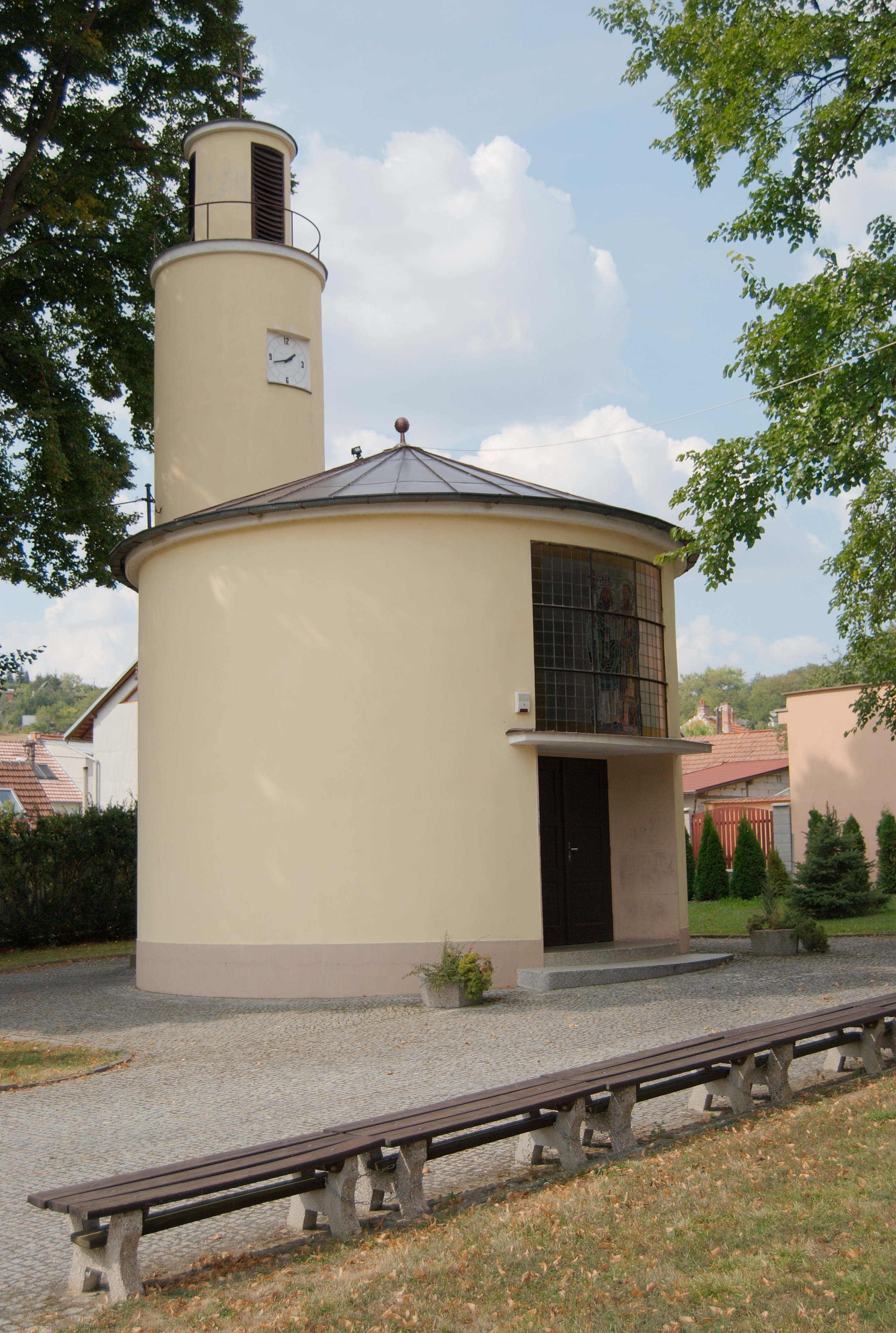 Brno-Kníničky - kaple sv. Cyrila a Metoděje.jpg